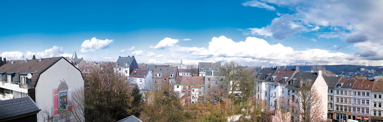 Ein Ausblick über den Ölberg in Wuppertal